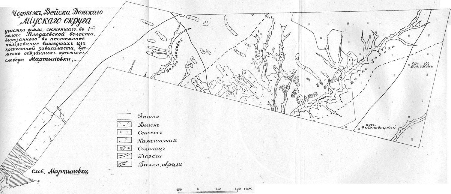 Чертеж Миусского округа Войска Донского